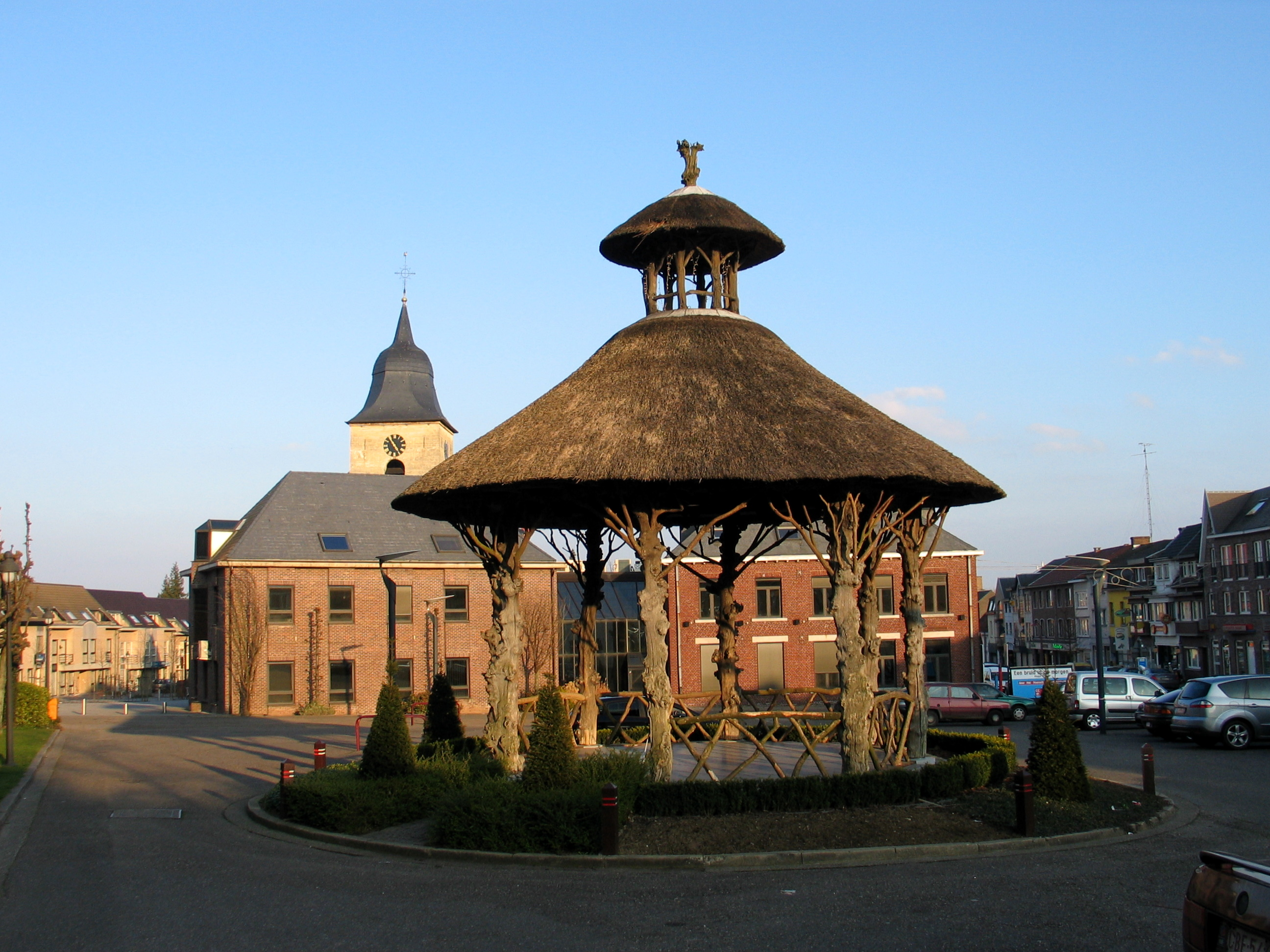 kiosk in Hoeselt, België